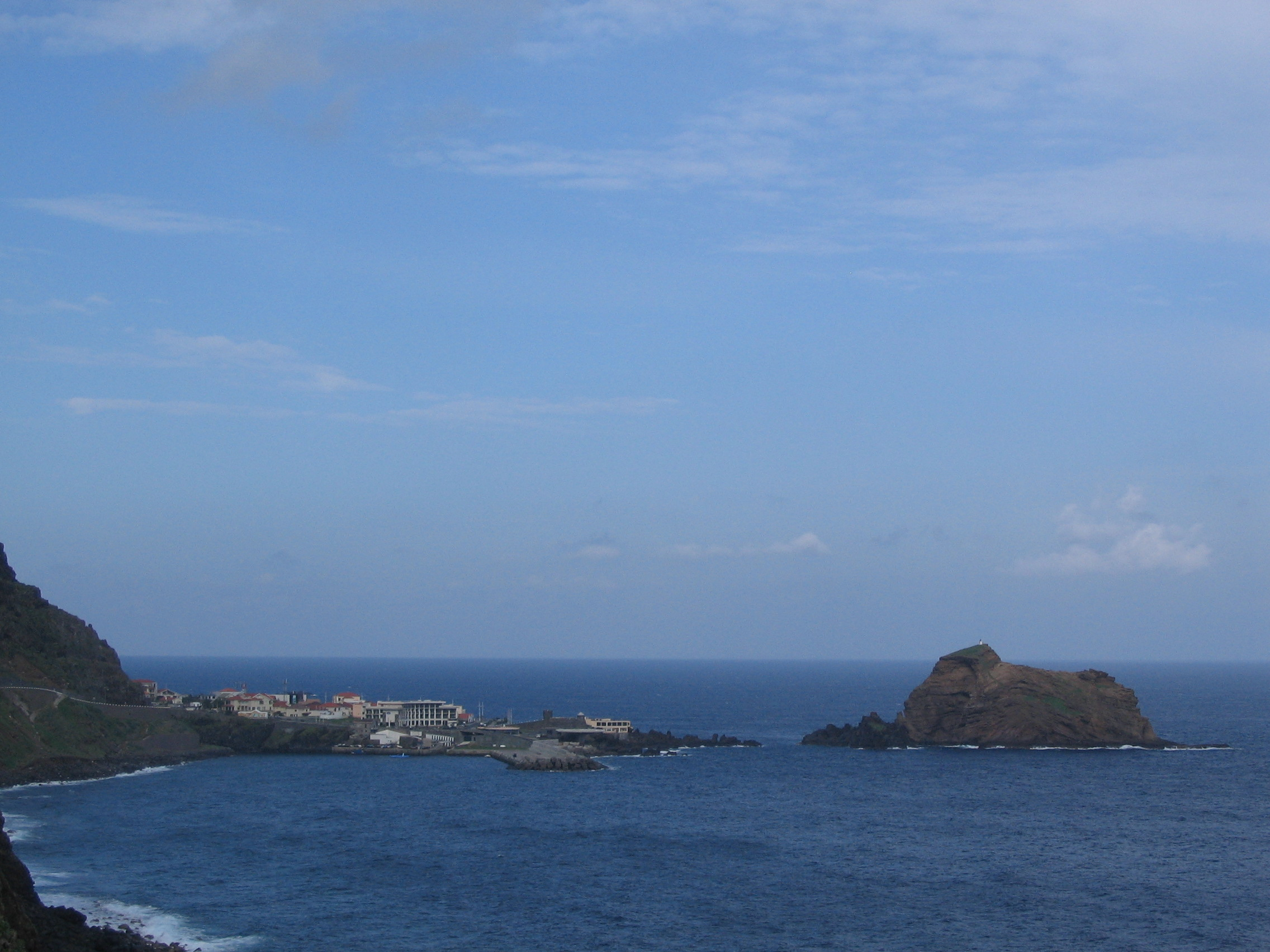 Az Ilhéu Mole szirt a meteorológiai megfigyelő állomással (Porto Moniz, Madeira)